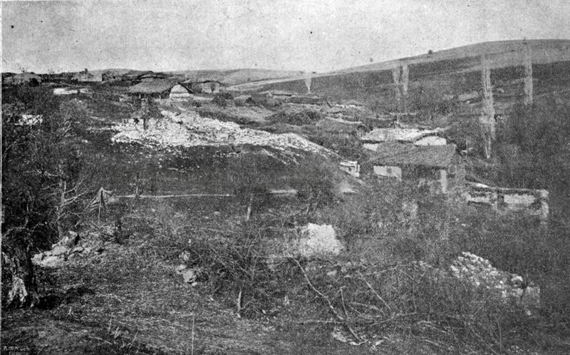 Село Люботен, Щипско